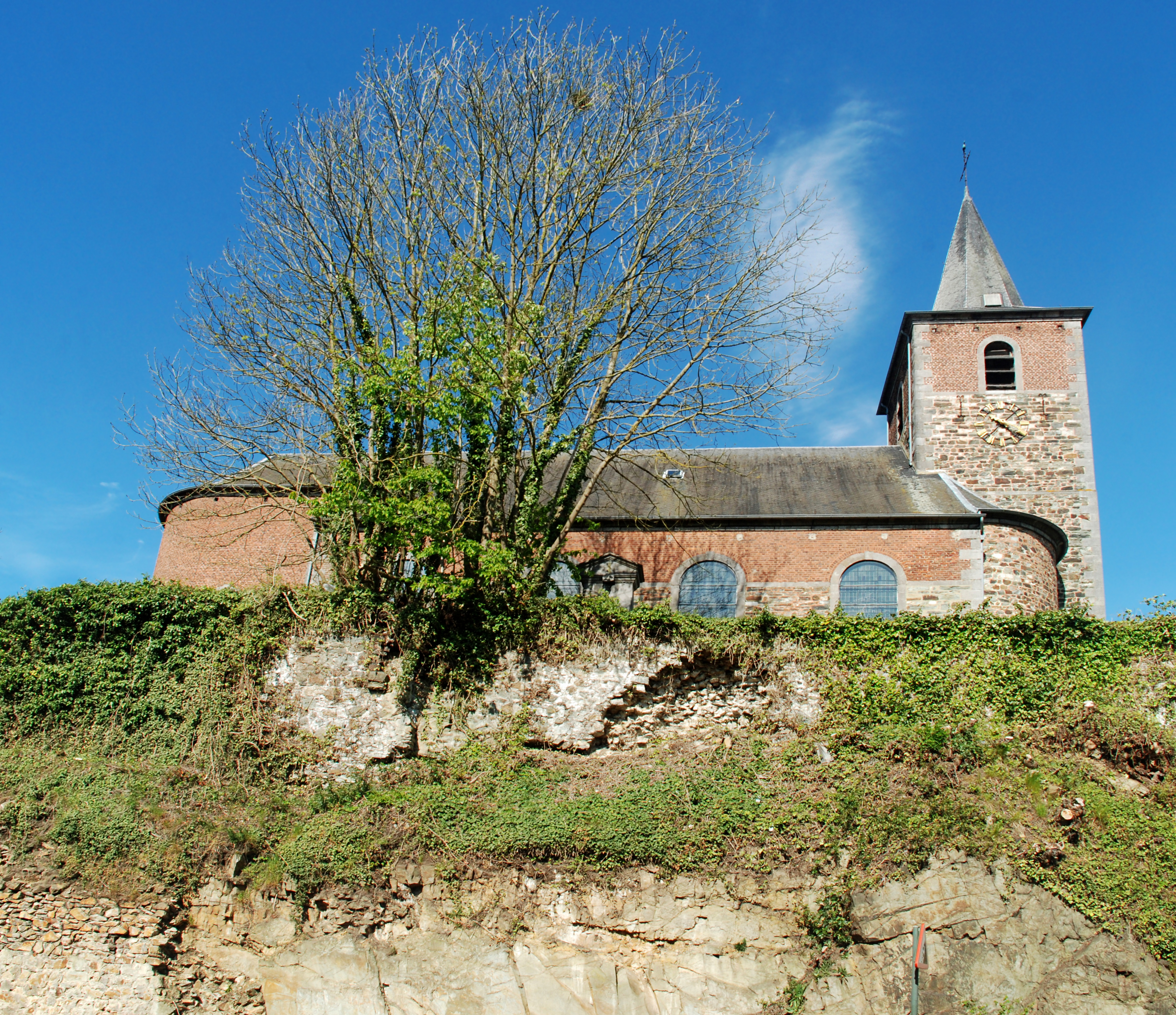 Belgique - Brabant wallon - Mont-Saint-Guibert - Église Saint-Guibert